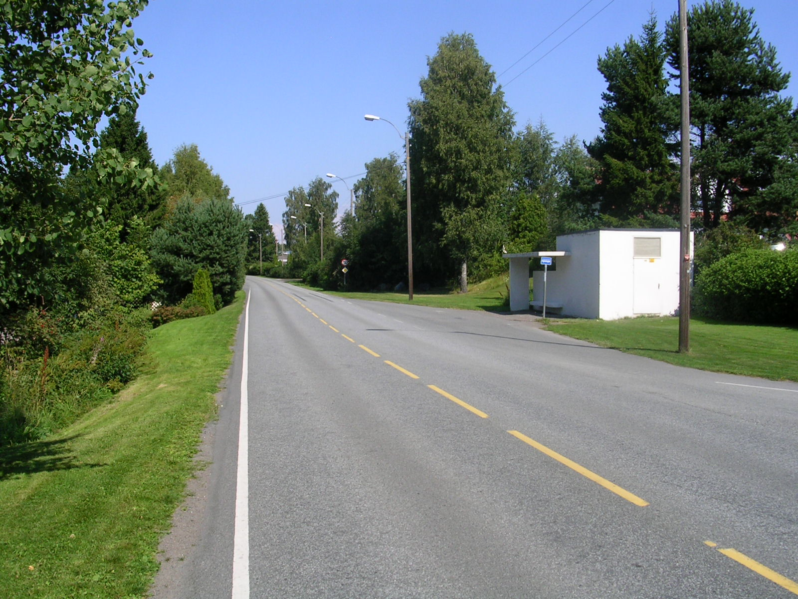 Amundrødveien i Vestkogen i Nøtterøy kommune